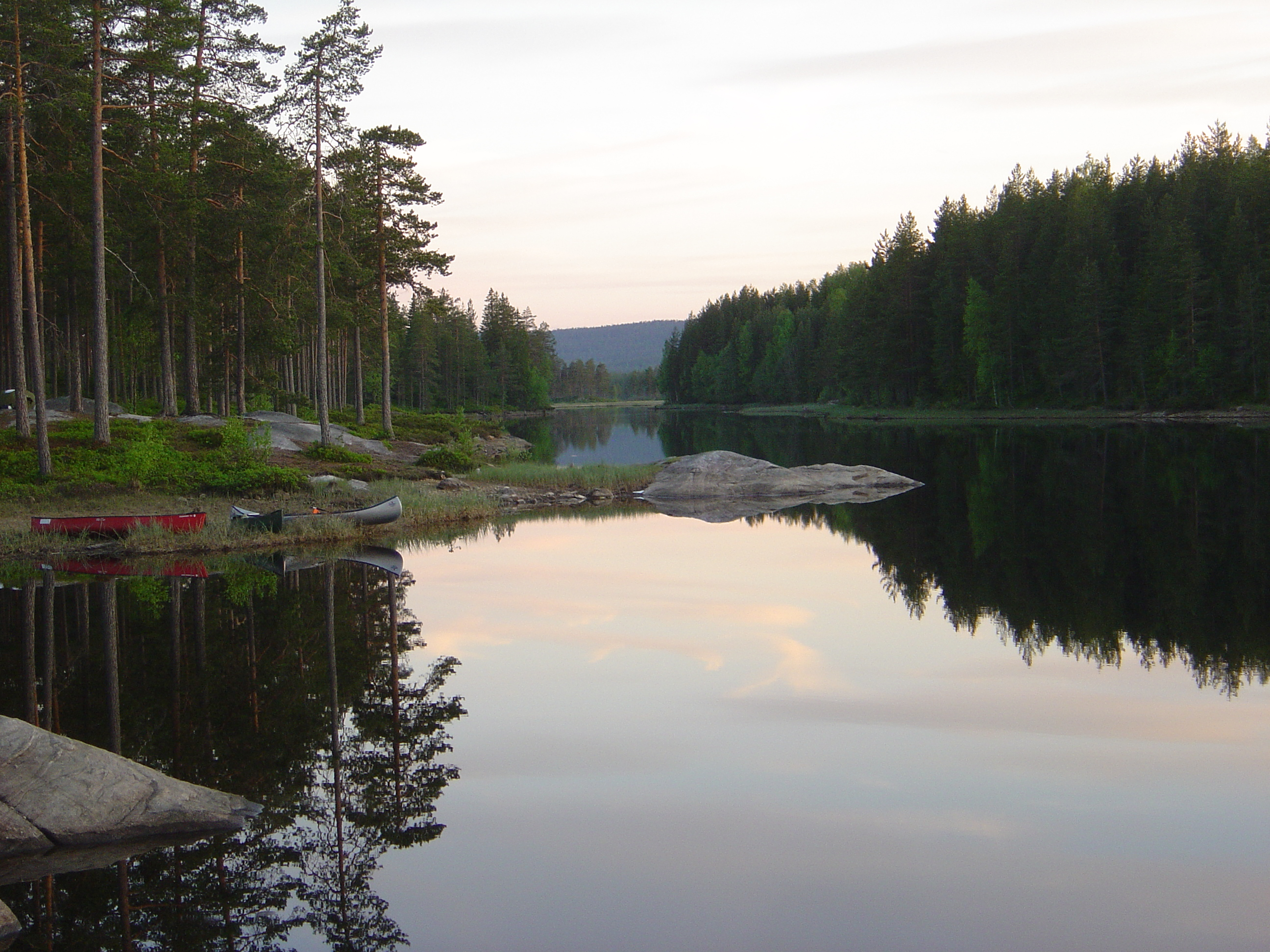 Velmunden, Fjorda